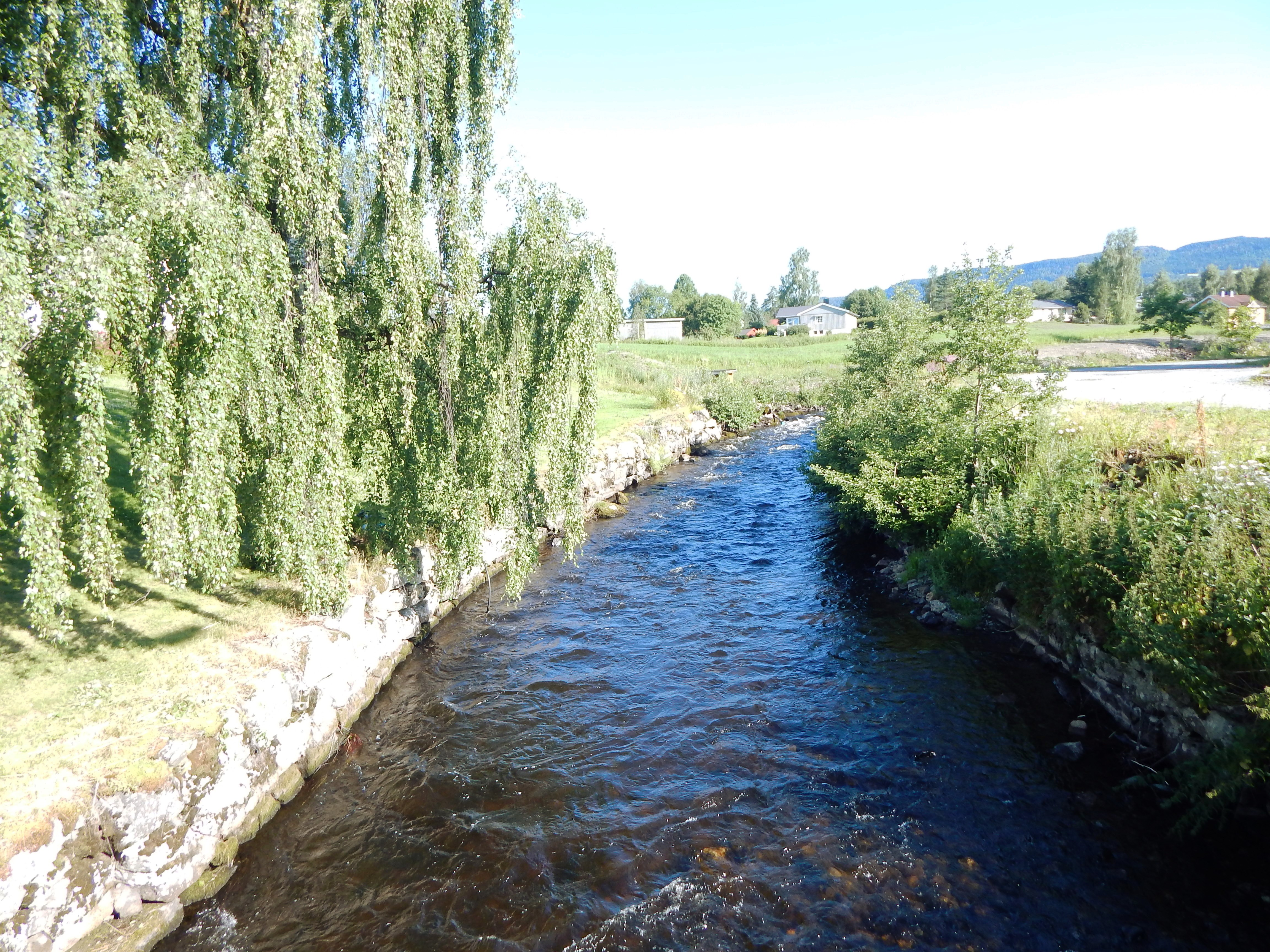 Moelva like ved Strand Brænderi